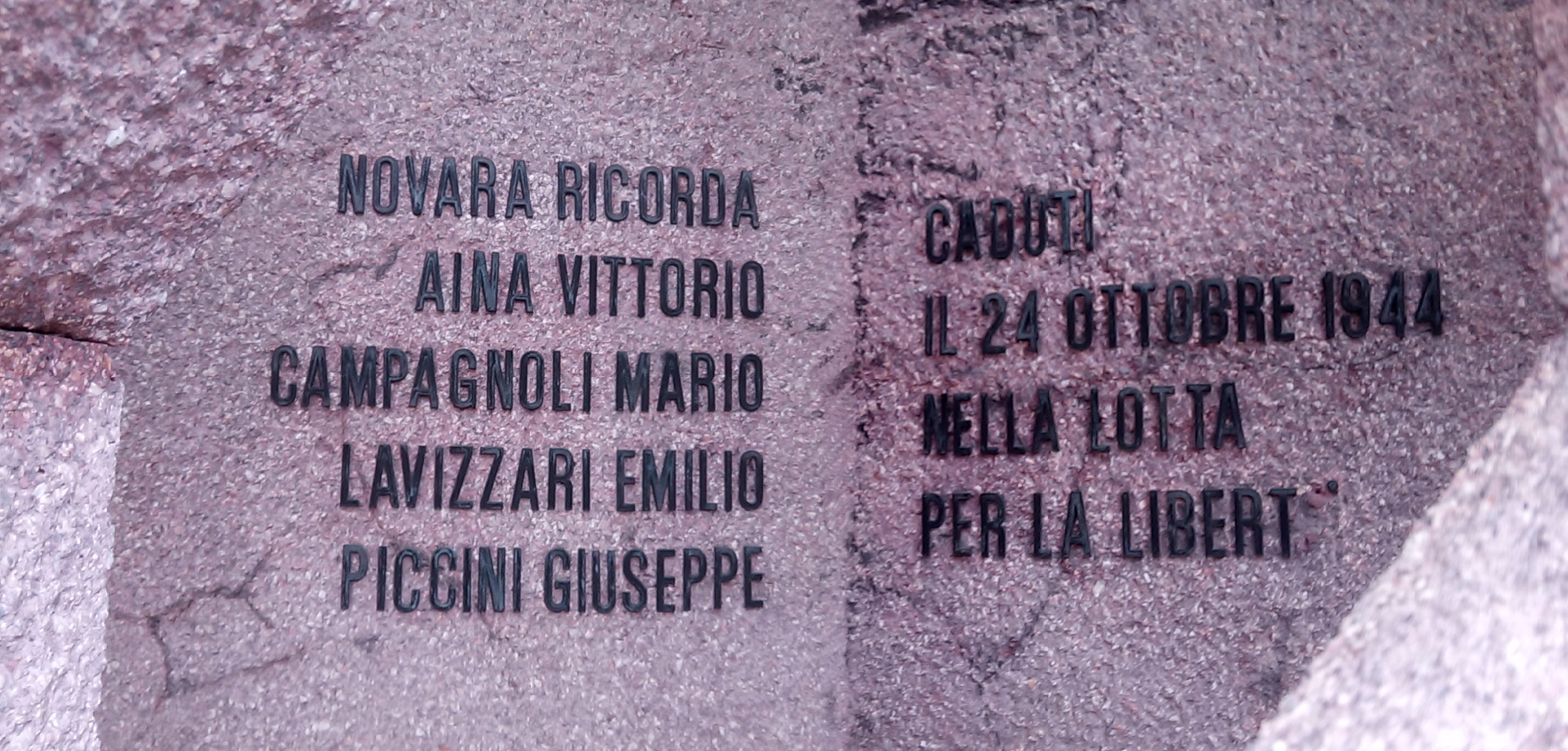 lapide con i nomi dei partigiani uccisi in piazza Cavour a Novara, presente all'interno del sacello